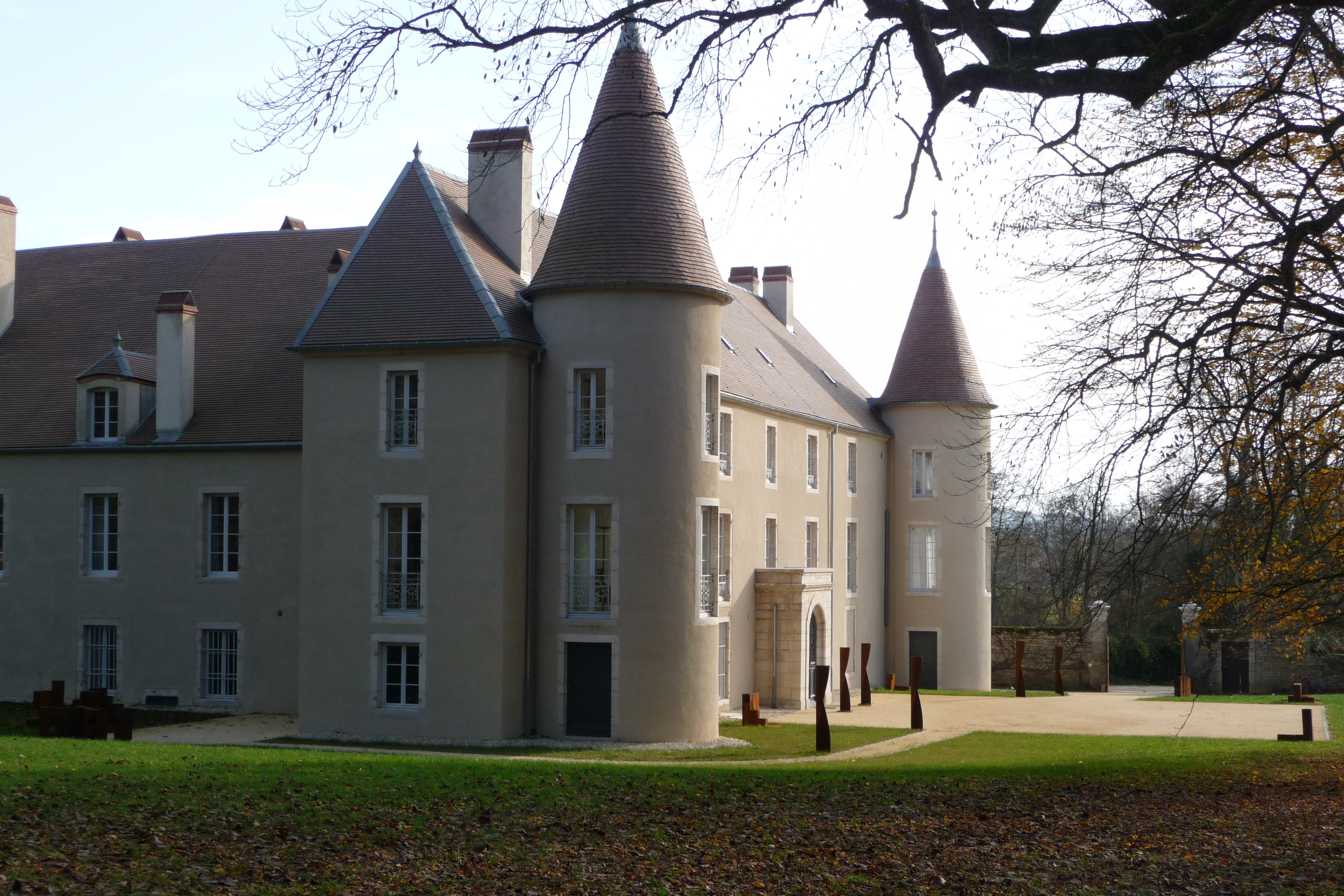 Chateau Sainte Marie – (Ansicht von Nordwesten) - Frankreich, Malans (Haute Saône)